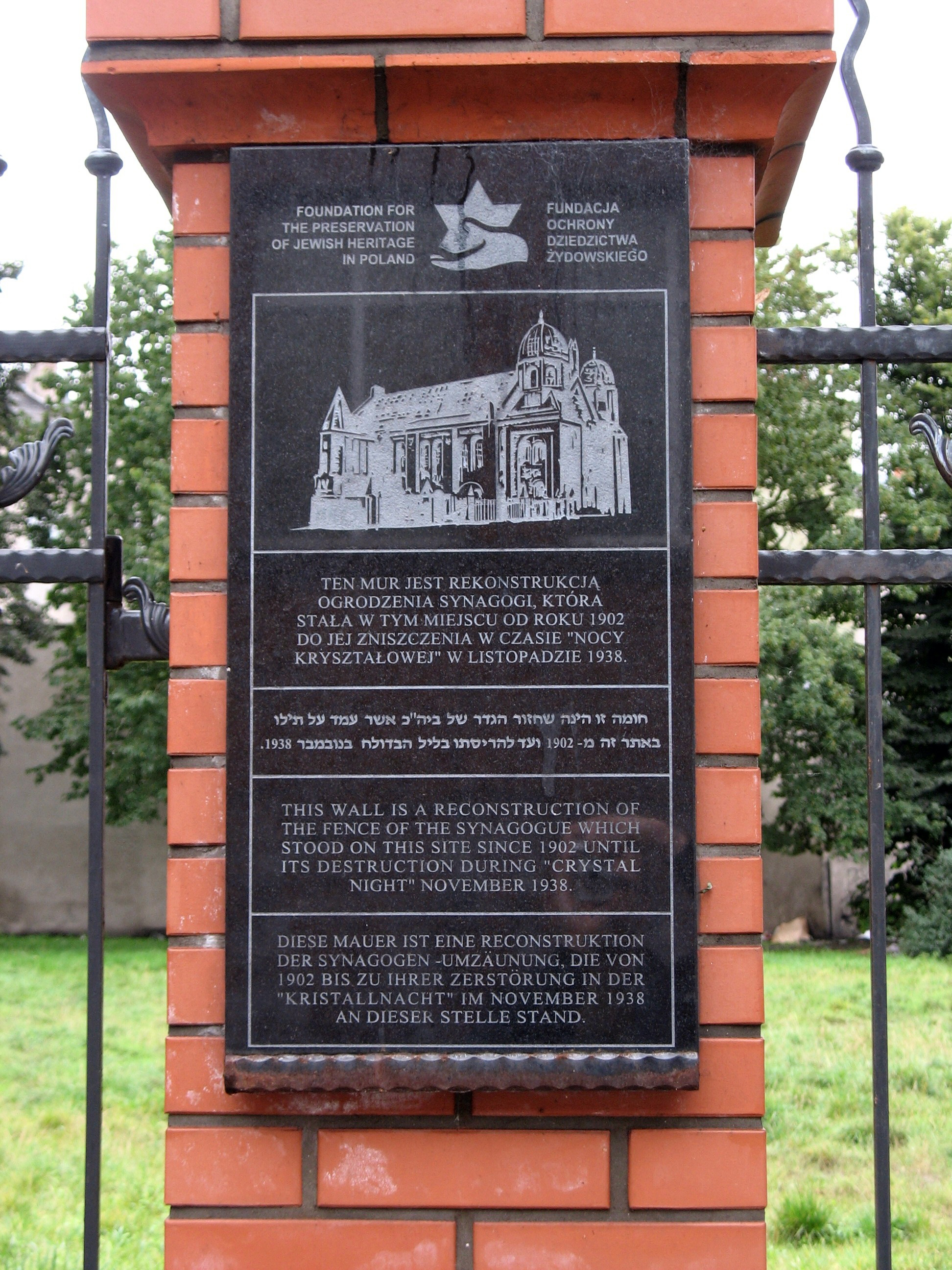 Tablica pamiątkowa umieszczona na rekonstrukcji ogrodzenia słupskiej symagogi.